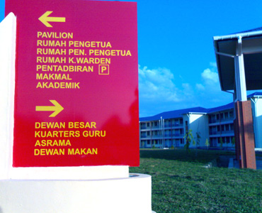 Maktab Rendah Sains Mara Merbok, Tanda Arah